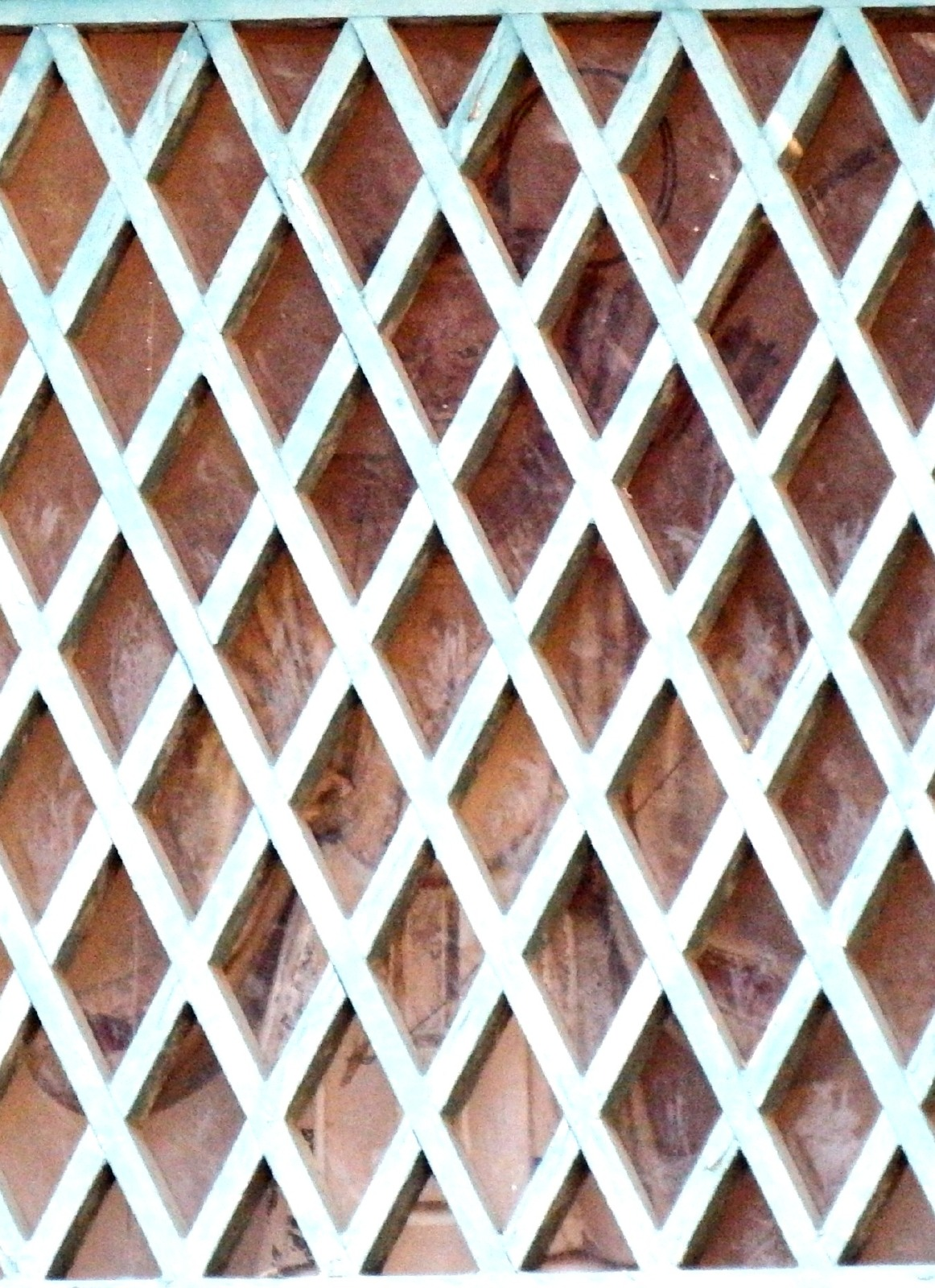 金刀比羅宮の白峰宮の随身像